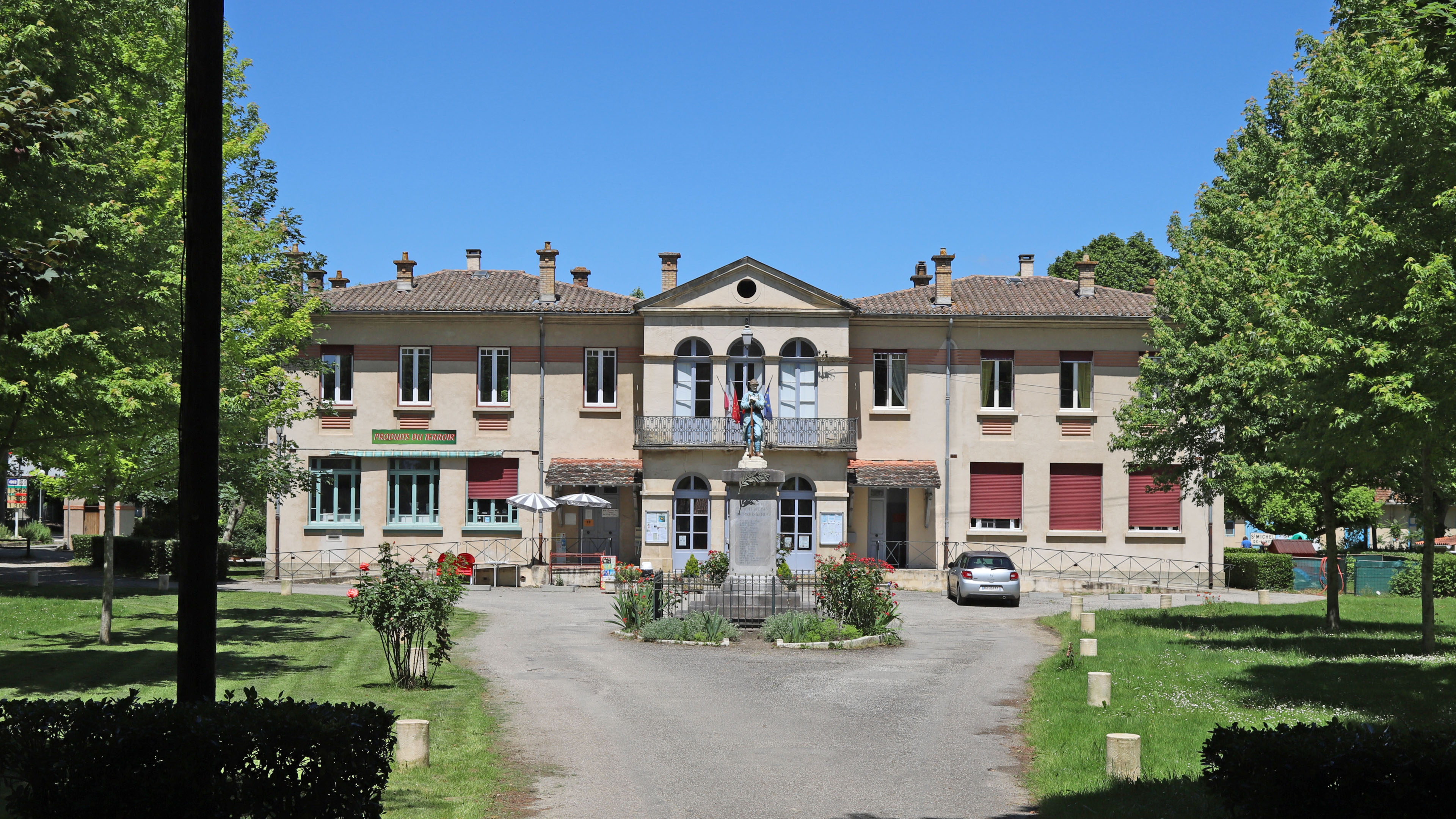 La Mairie en 2020